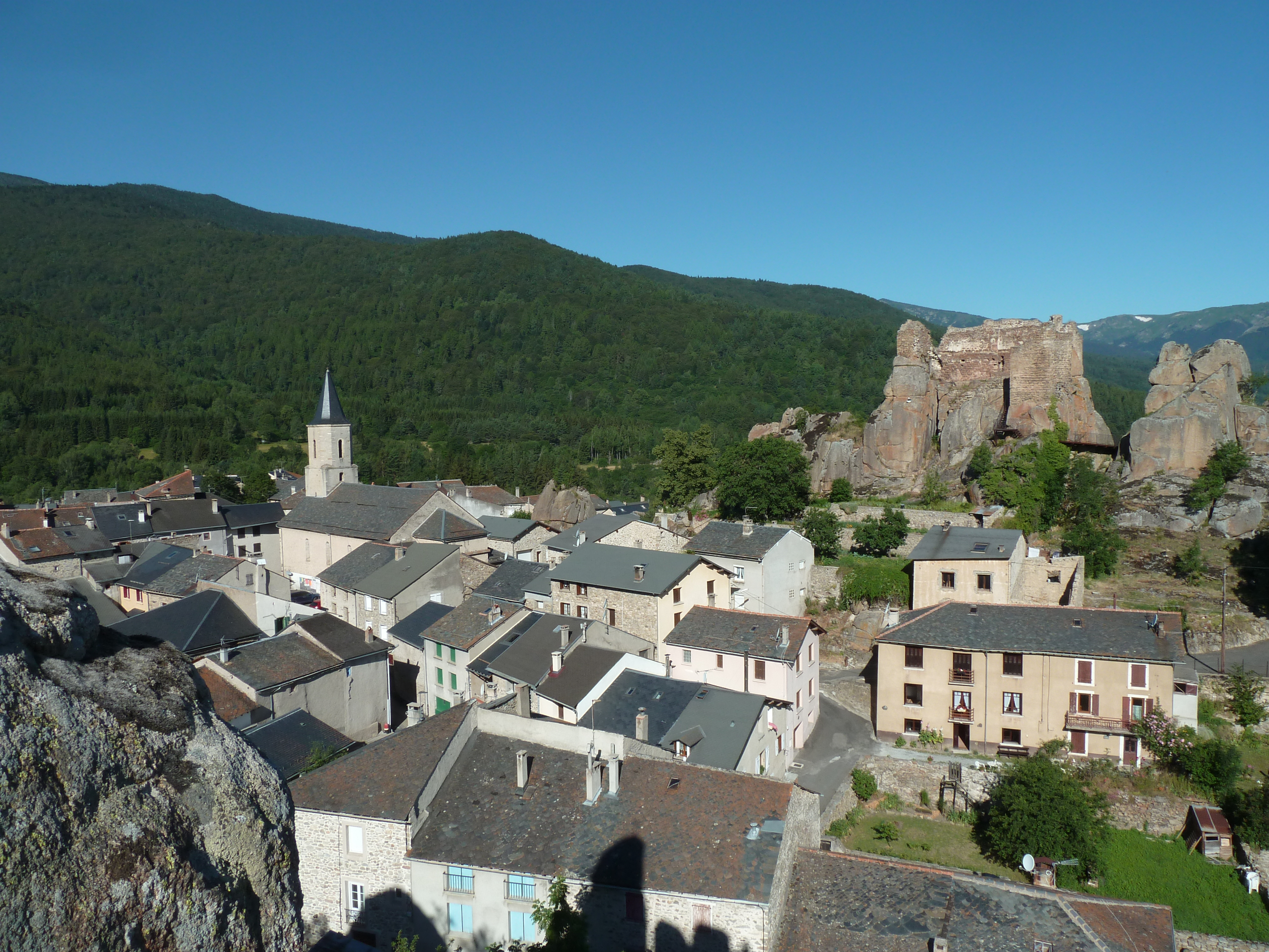 Le village de Quérigut, l'église et le château